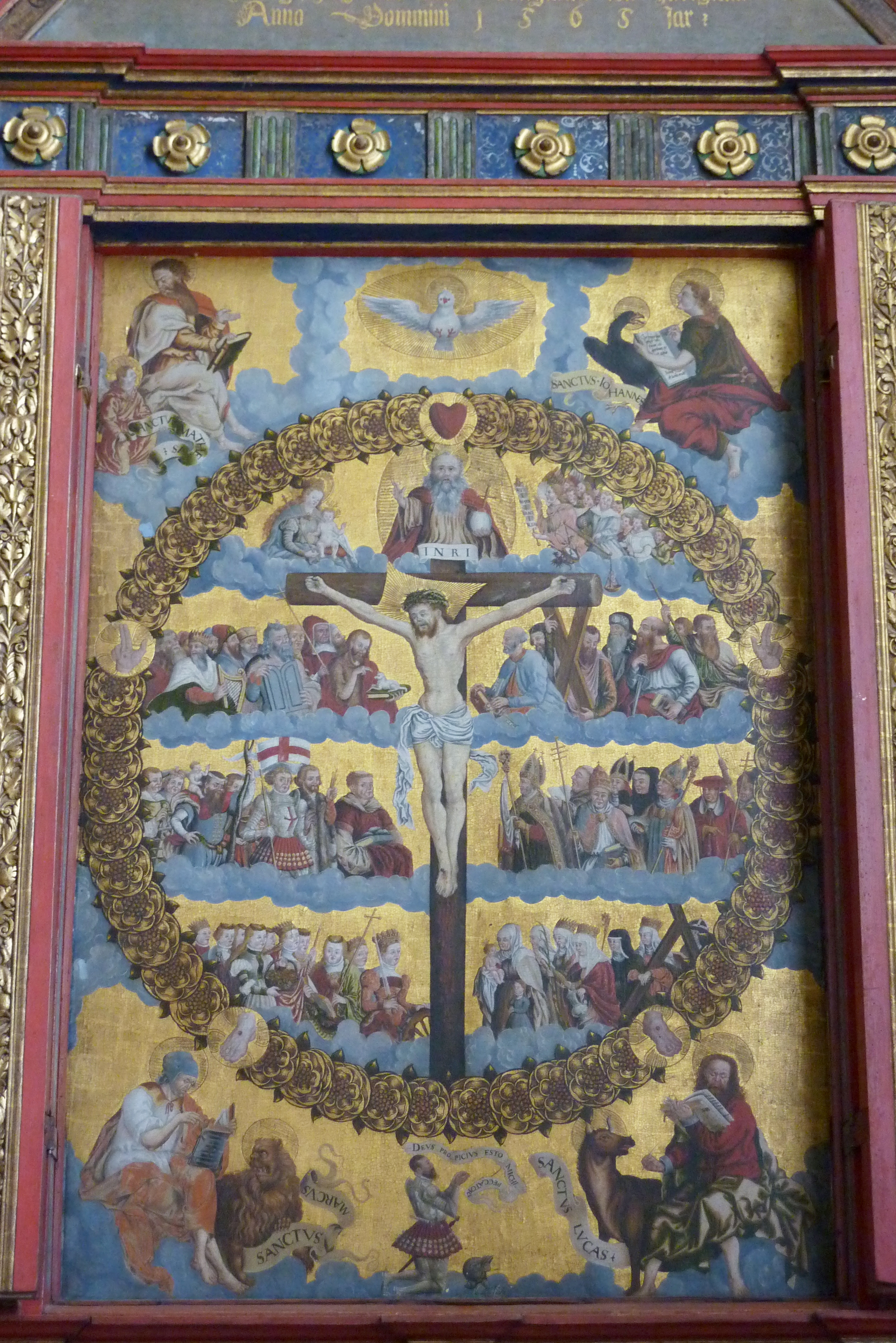 Katholische Pfarrkirche Mariä Himmelfahrt in Hochaltingen, einem Ortsteil von Fremdingen im Landkreis Donau-Ries (Bayern), Rosenkranzaltar von 1565, Malerei Öl auf Holz, Mittelteil: Rosenkranzbild mit Gnadenstuhl, umgeben von den vier Evangelisten